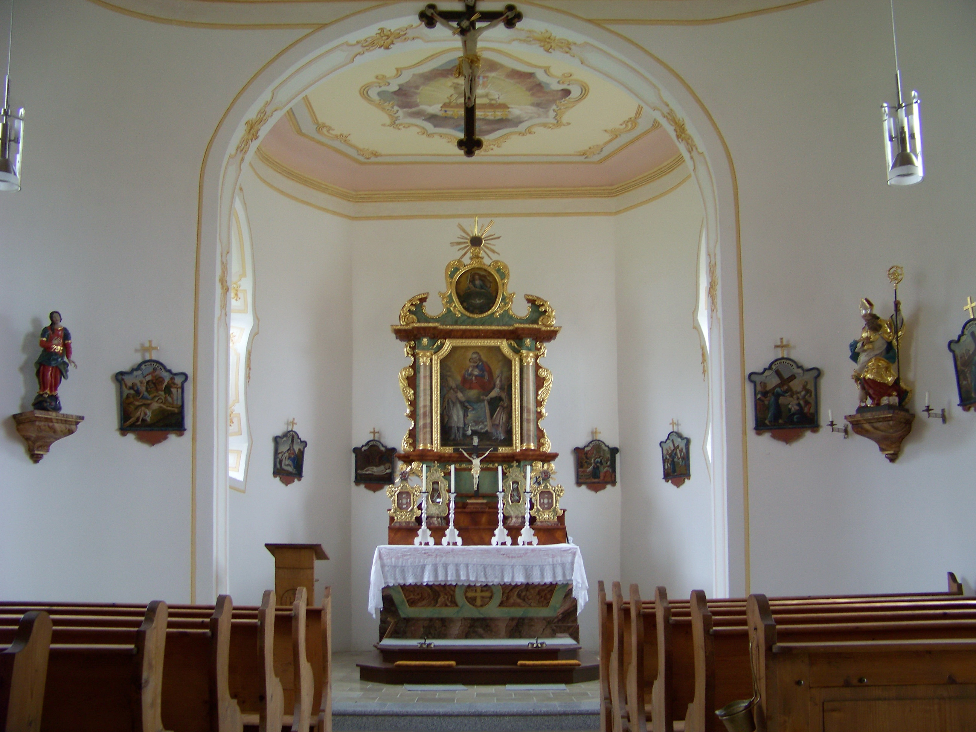 Bayerbach, Pram, Haus Nr. 9. Filialkirche St. Martin und Nikolaus. Saalkirche, von 1758, Apsis romanisch, mit kleinem Turm über der Apsis, mit Achteckaufsatz und Zwiebelkuppel; mit Ausstattung. Innenraum.